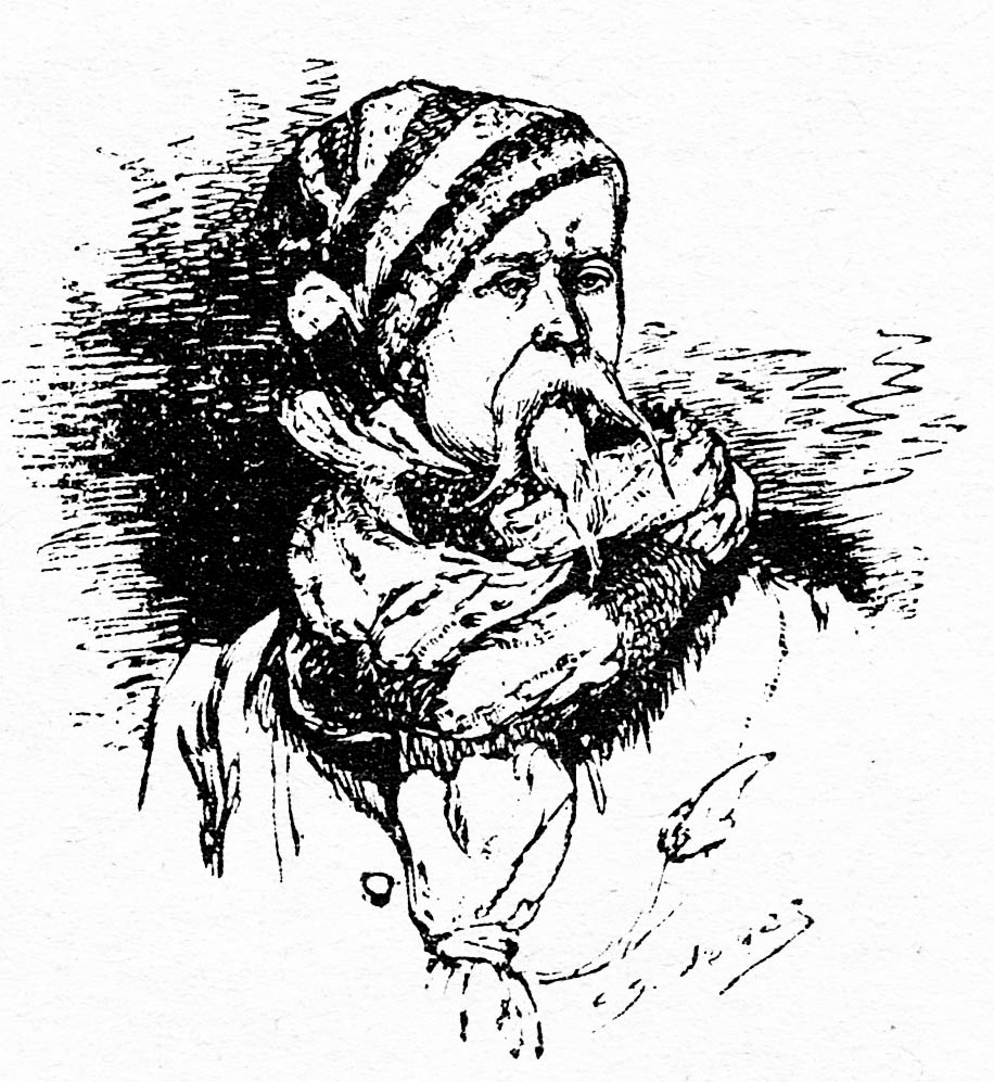 Nansouty, par Charles Jouas. Vignette de couverture, tome IV de "Cent Ans aux Pyrénées", de Henri Beraldi.